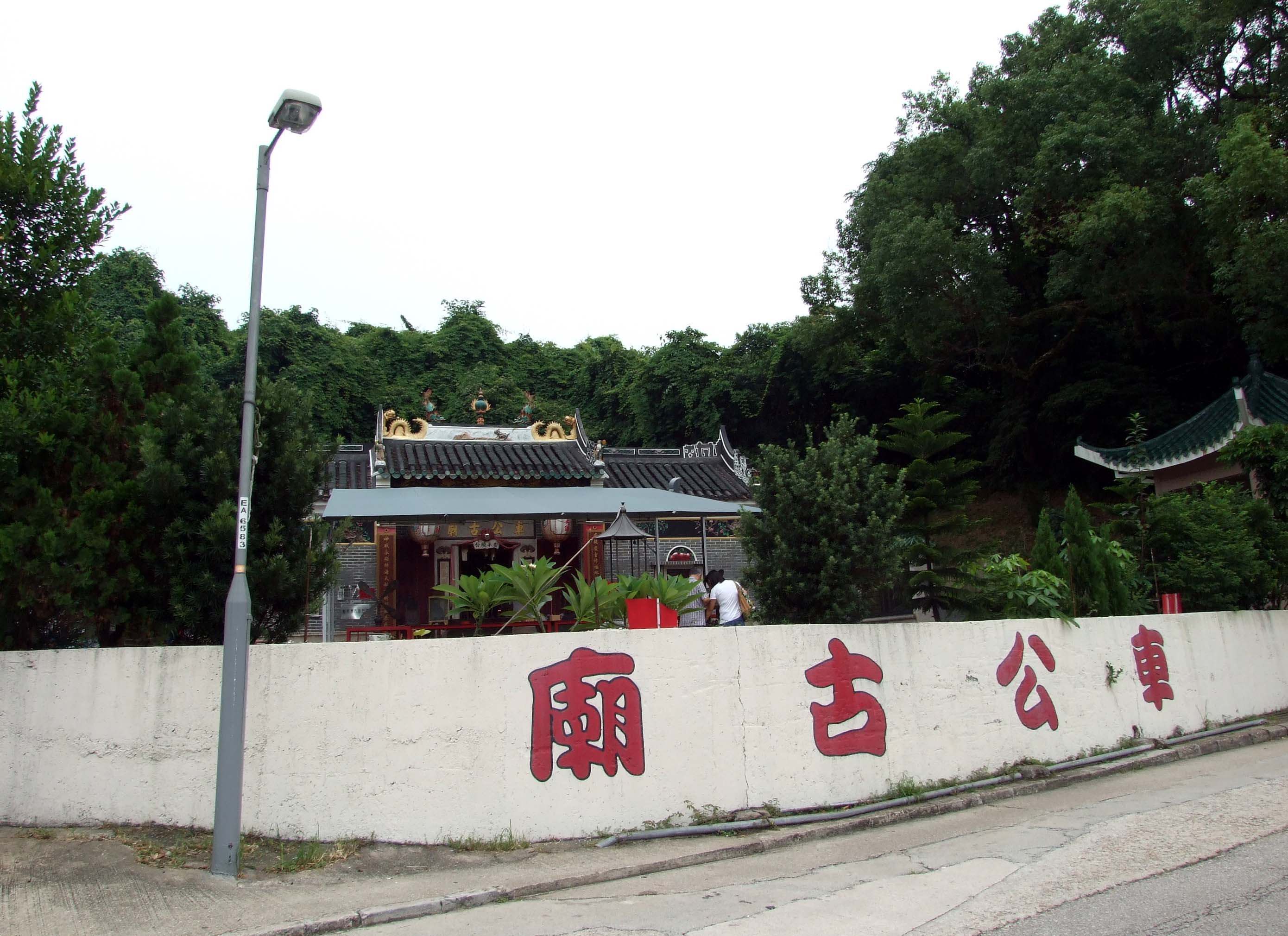 中文（香港）: 蠔涌車公廟